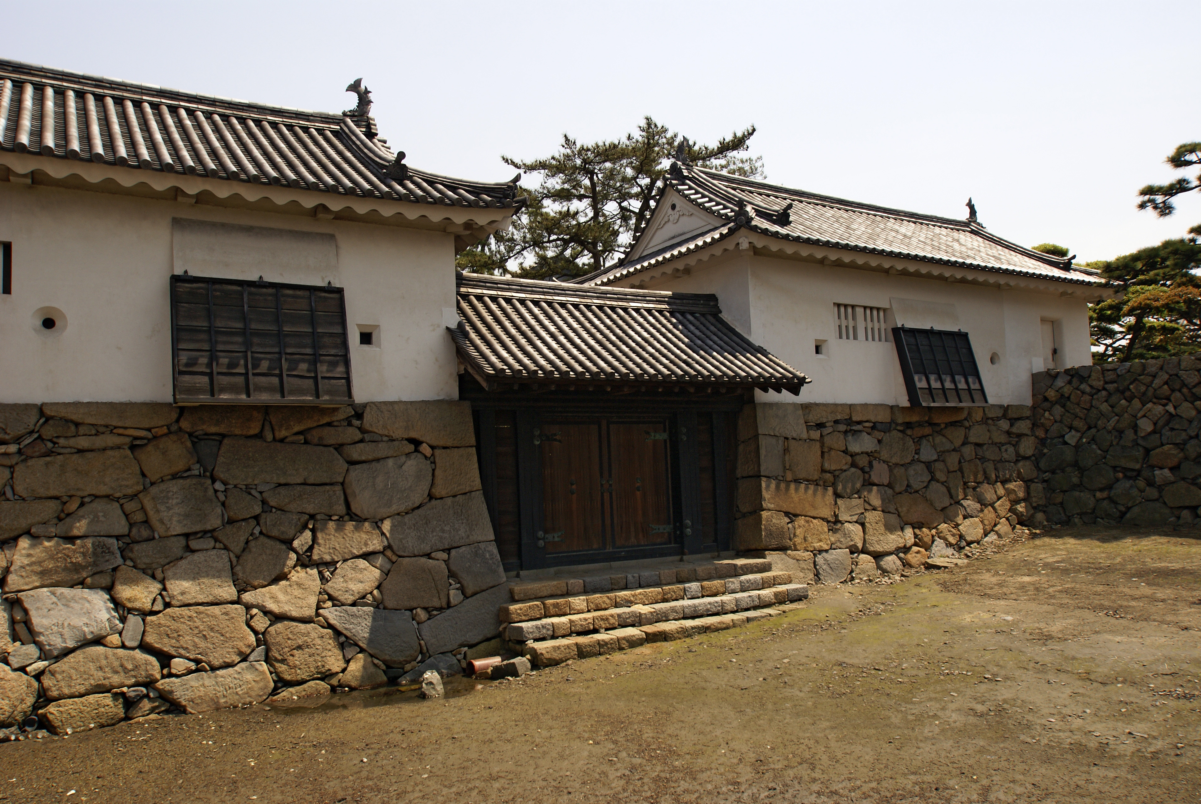 Takamatsu Castle (Tamamo park) in Takamatsu, Kagawa prefecture, Japan